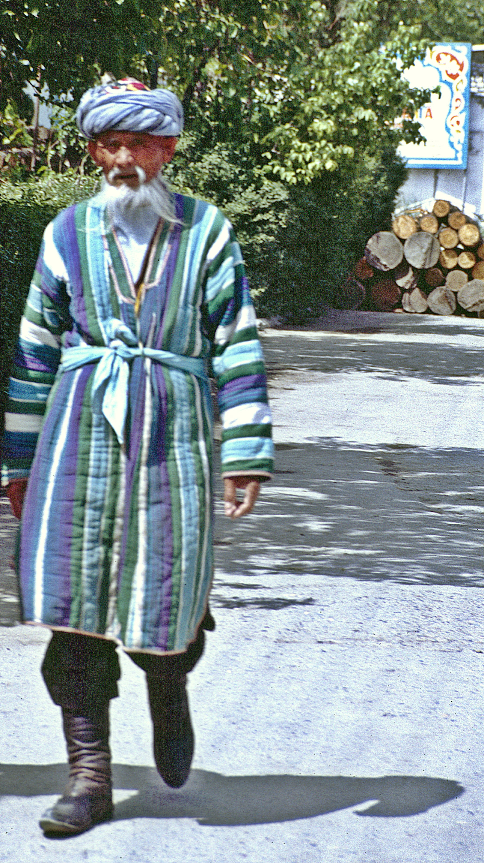 alter Usbeke in Buchara